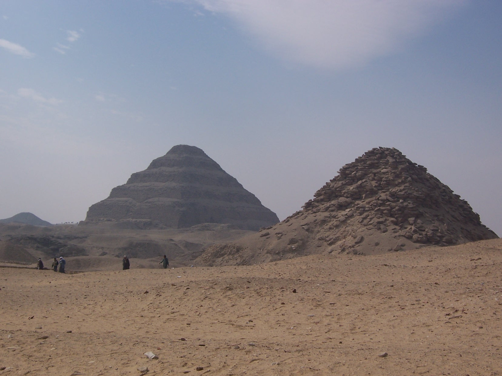 Pictures from Saqqara, Egypt